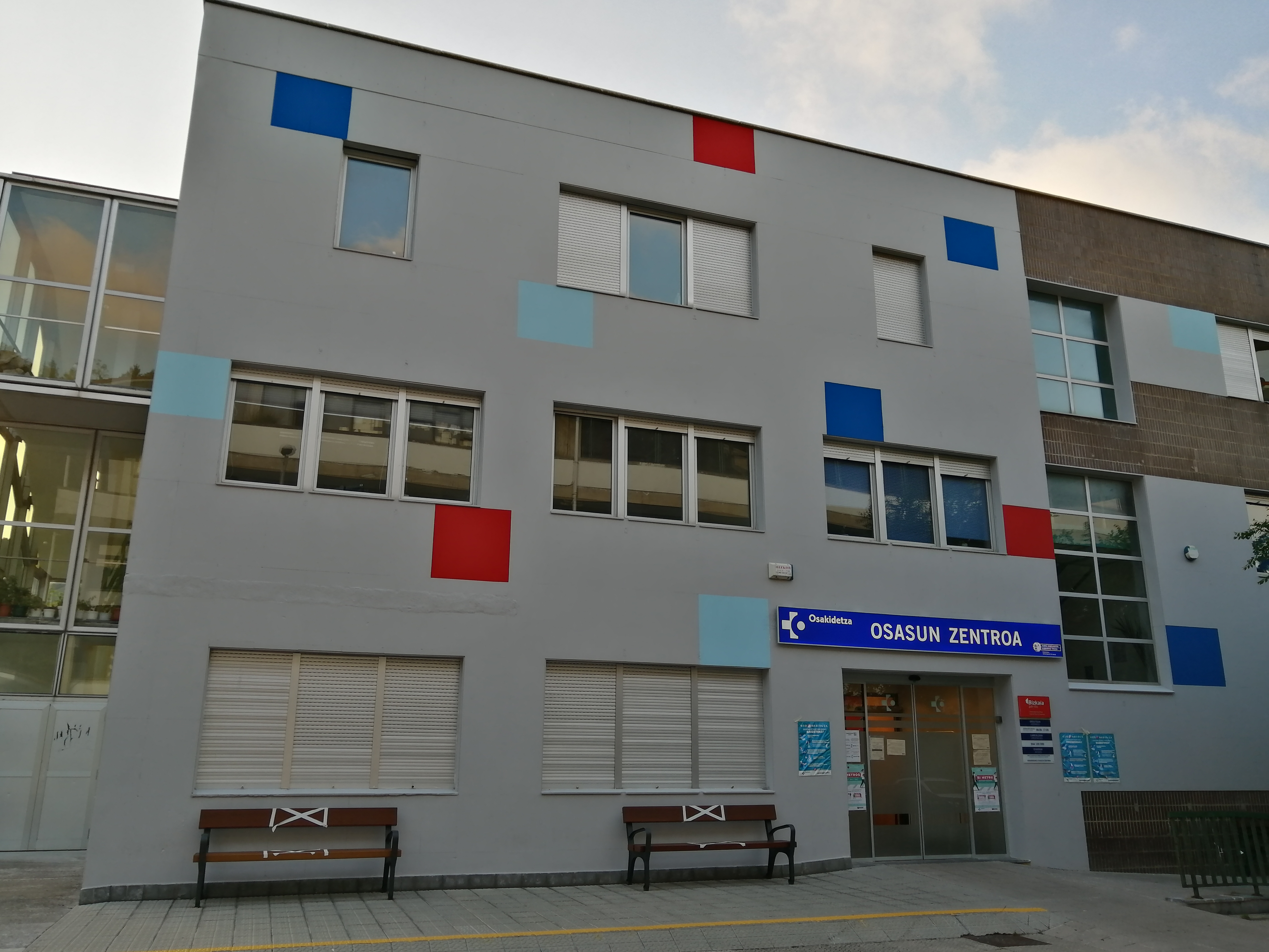 Ondarroako anbulatorioa, Kamiñazpi auzoan